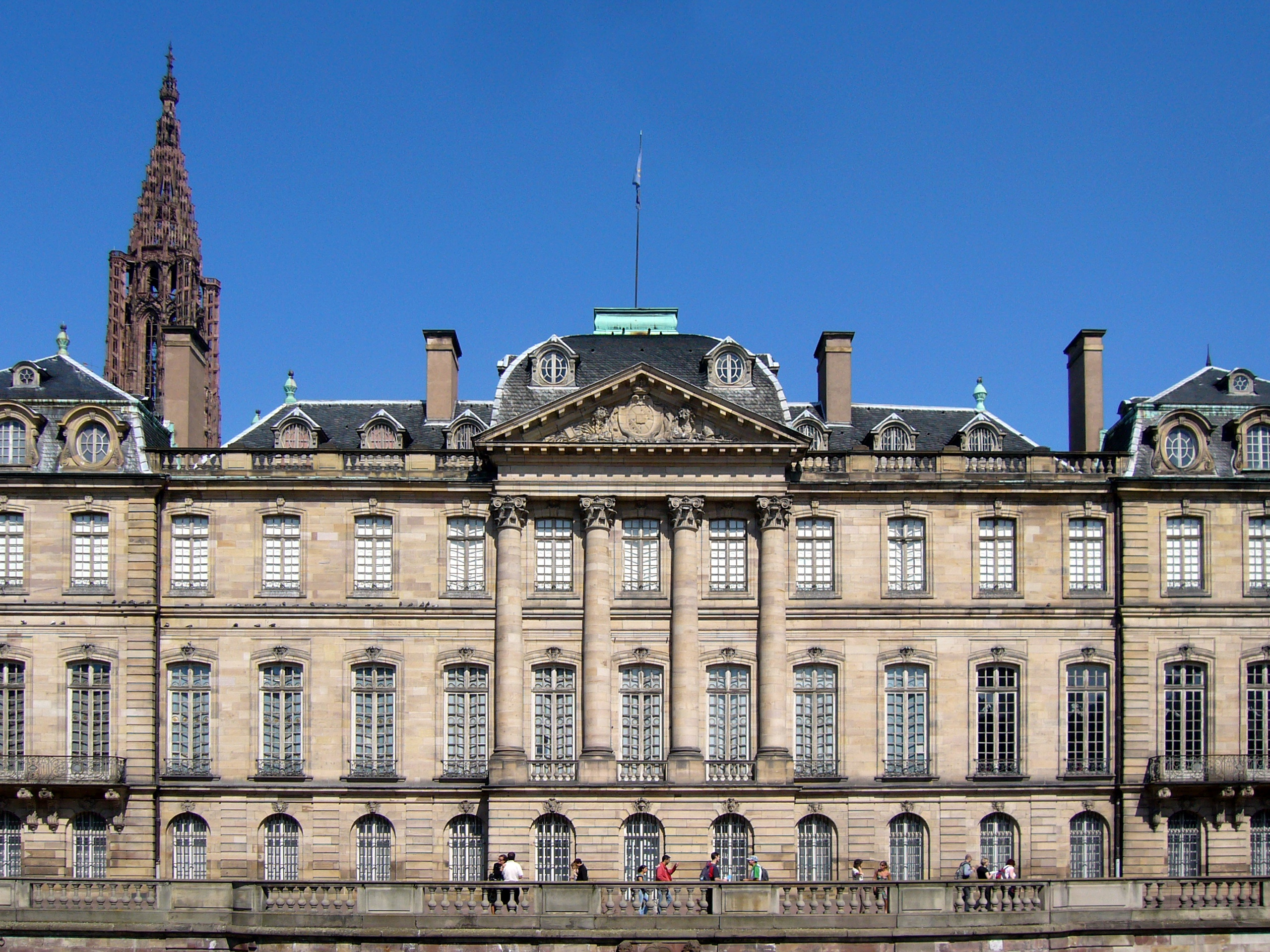 Le palais des Rohan (ou palais Rohan) à Strasbourg